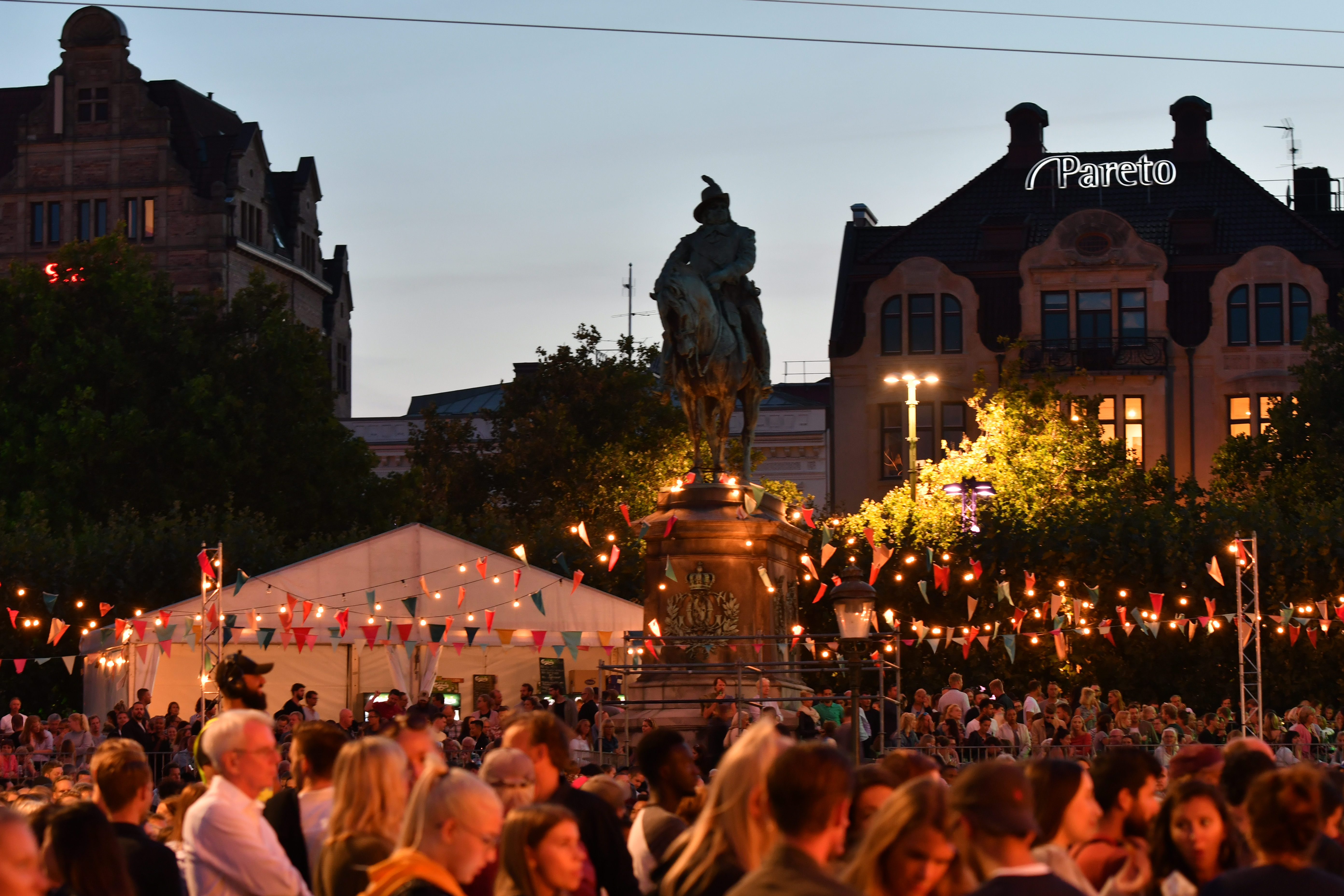 Folkvimmel på Malmöfestivalen 2018.